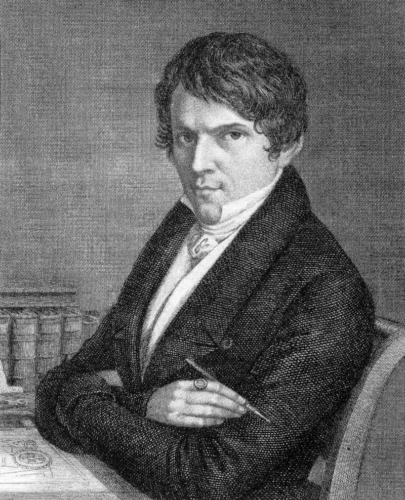 Porträt Conrad Georg Kuppler, Stahlstich von Friedrich Fleischmann, ca. 1825. Scan aus: Franz Sonnenberger: Der Brückenbauer. Conrad Georg Kuppler. Lebensbild des Nürnberger Technikpioniers an der Schwelle zum Industriezeitalter. Schrenk-Verlag Röttenbach 2017. ISBN 978-3-924270-89-6